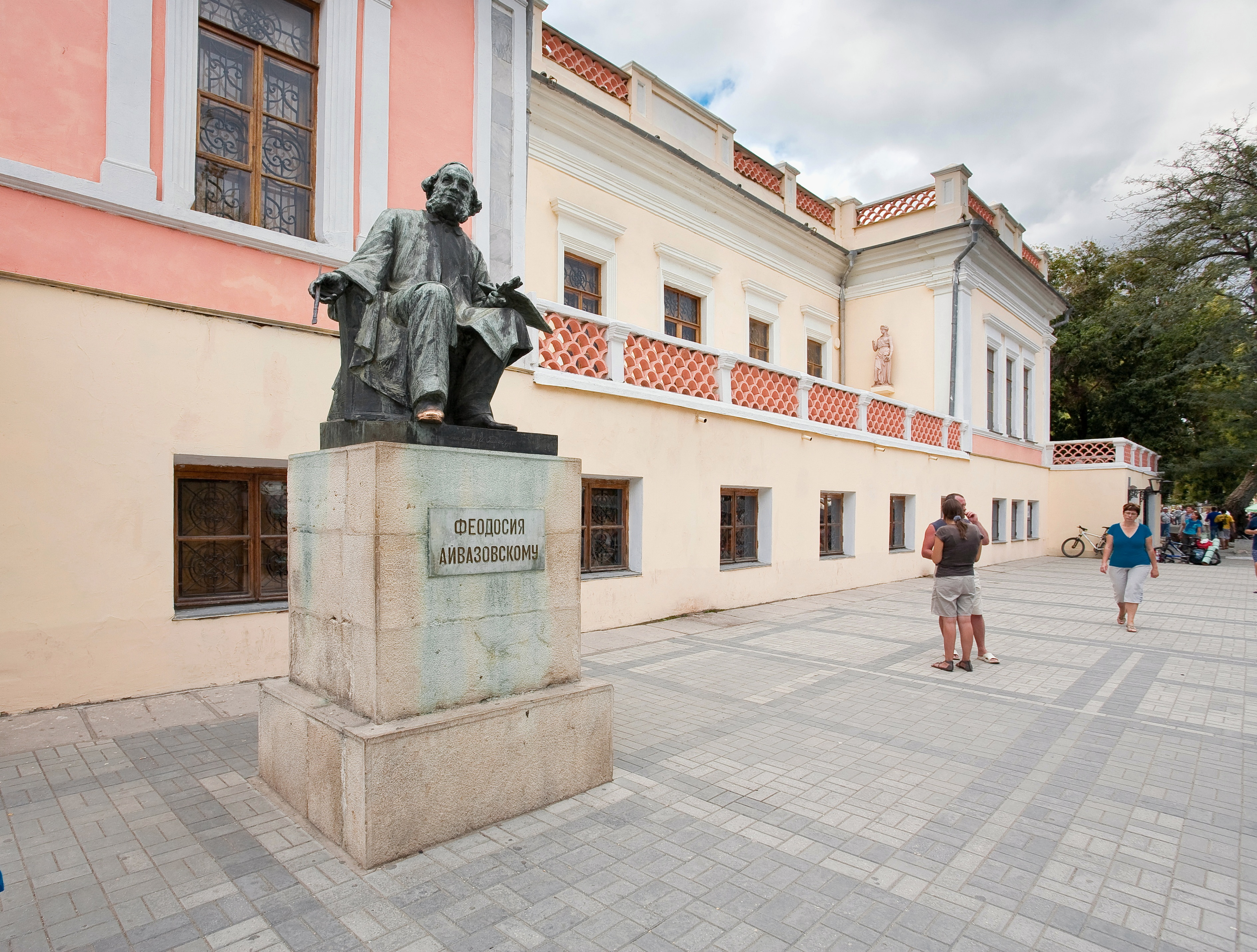 Феодосія, на розі вул. Галерейної, 2, та просп. Айвазовського, 15-17 (колишній пр. Леніна)